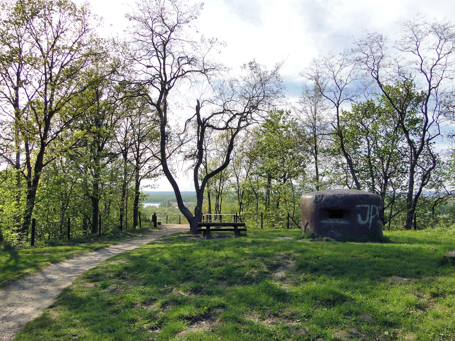 Polana Widok w Szczecinie Zdrojach